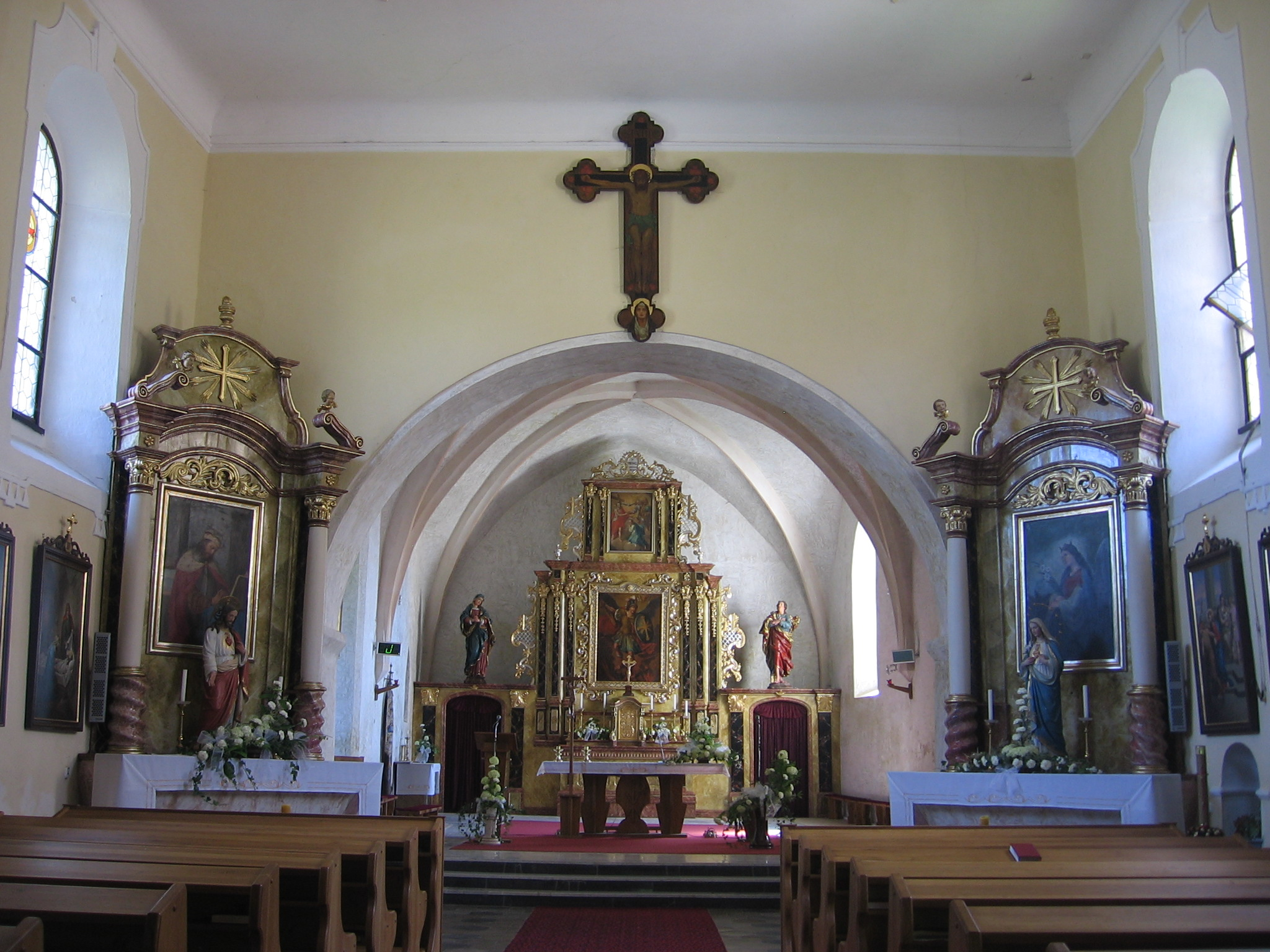 Interiér kostelu Archanděla Michaela, Jistebnice, okr.Tábor